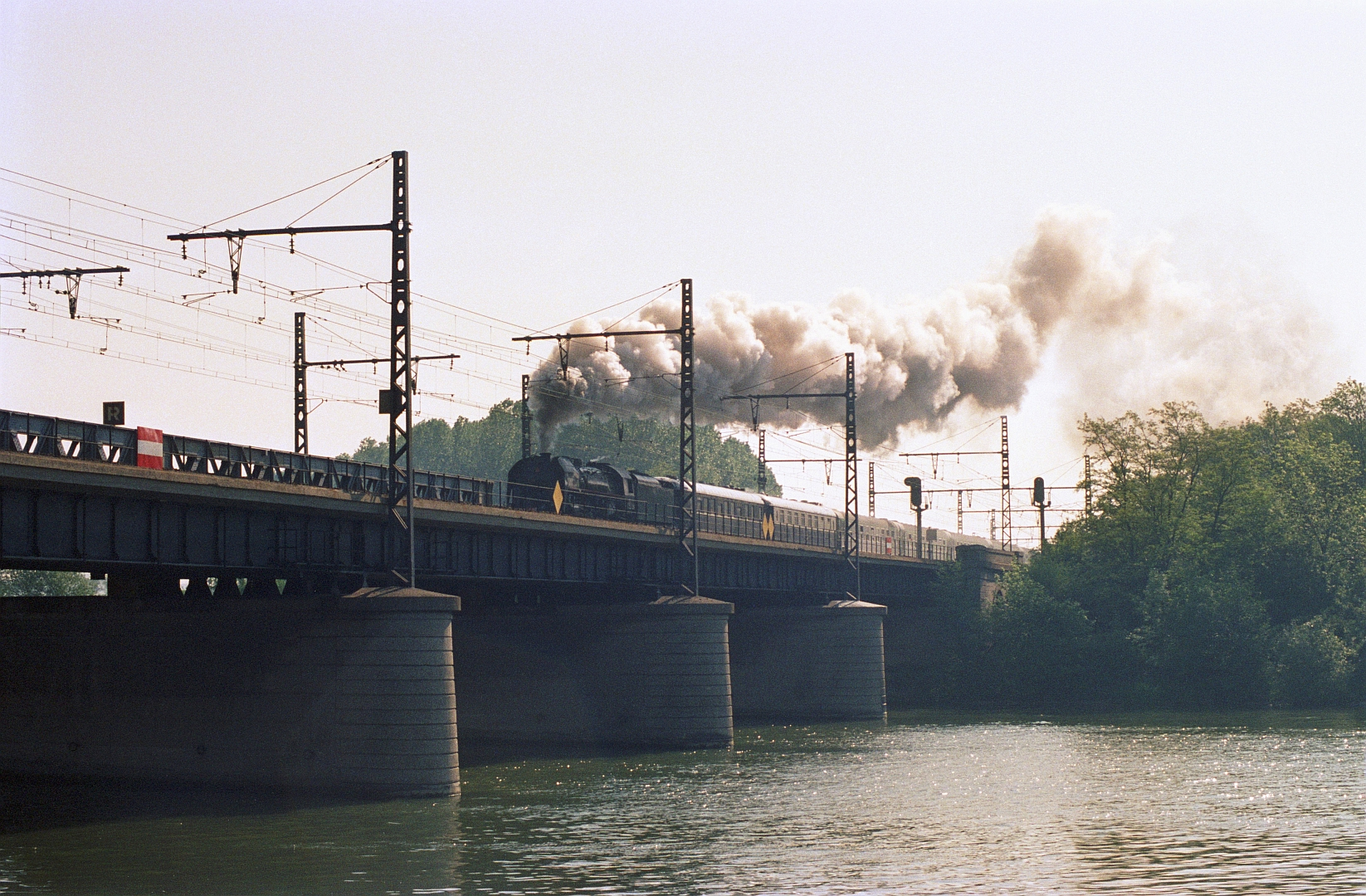 La 141 R 420 franchit la Seine sur le pont d'Athis-Mons le 24 mai 1987.